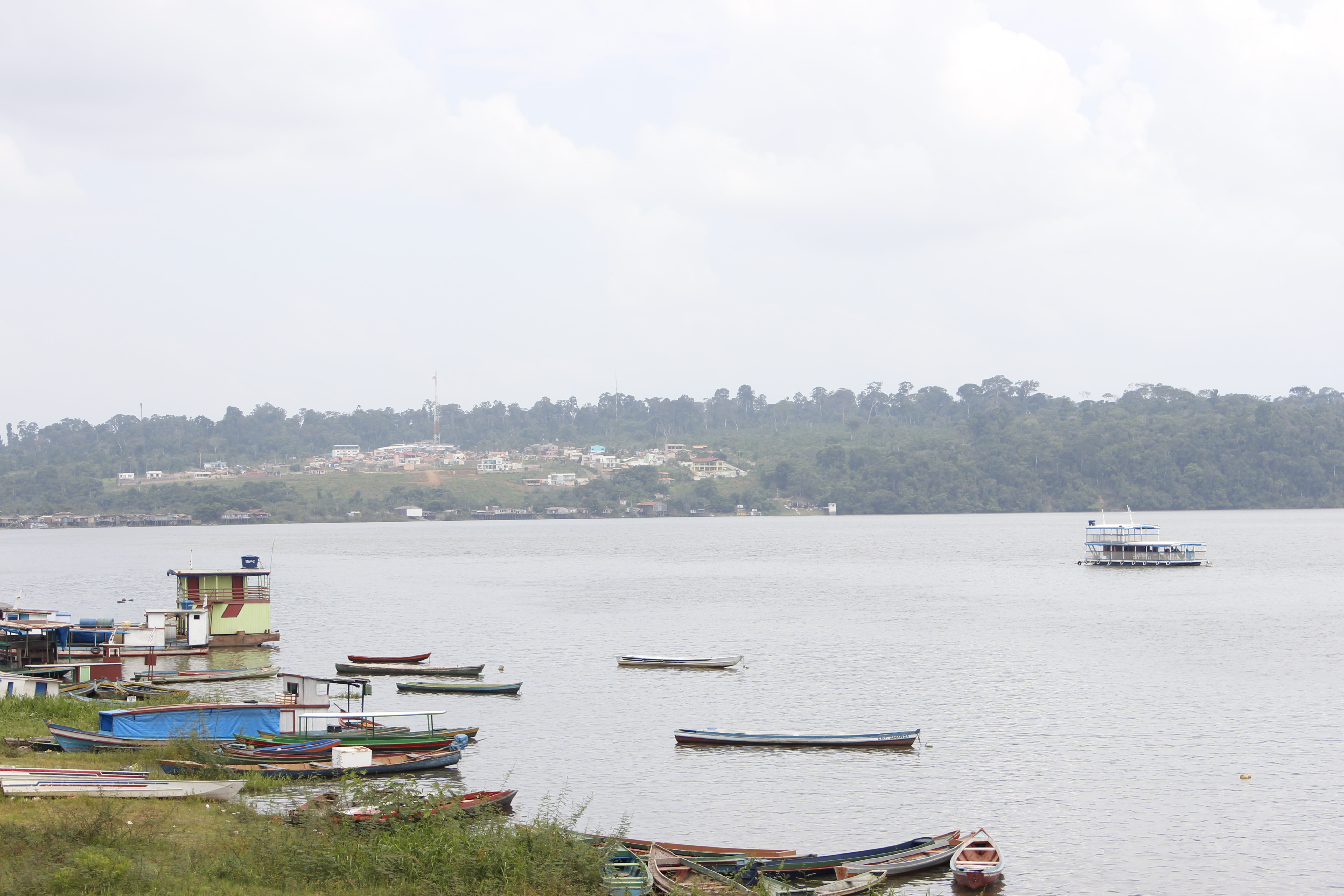 Barcos estacionados na orla do rio Xingu, localizado na cidade de Altamira (PA).